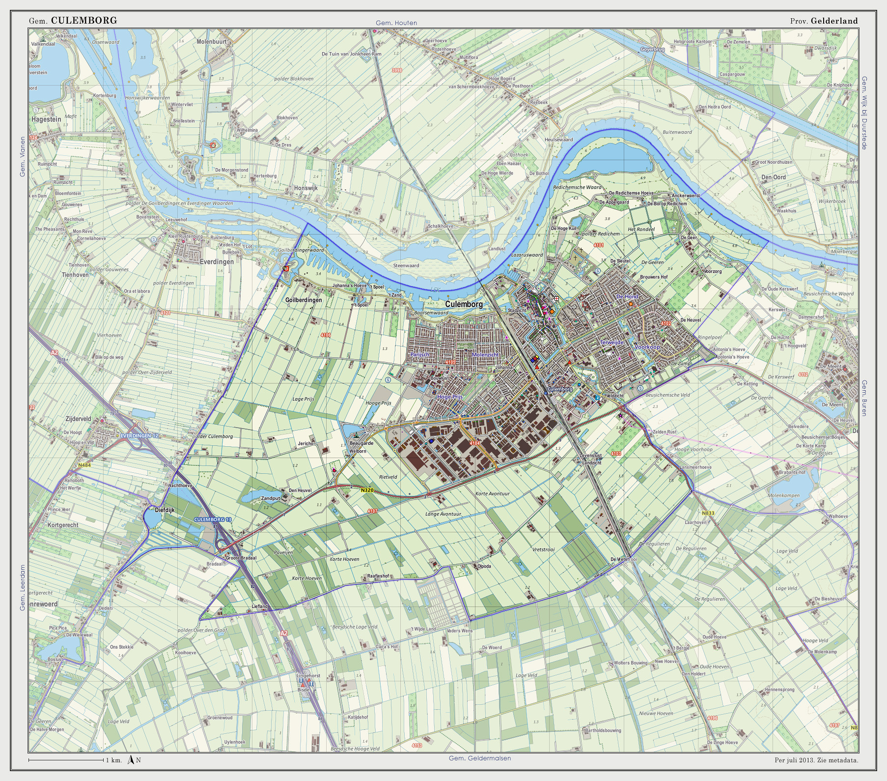 Topografische kaart van gemeente Culemborg (2013). Samengesteld door Jan-Willem van Aalst op basis van de GML open geodata van de BRT/Top10NL (basisregistratie Topografie, Kadaster 2011), vrijgegeven door Kadaster onder de Creative Commons BY licentie. Additionele gegevens uit BAG (8 juli 2013), uit de Open Street Map (9 juli 2013) en uit de Risicokaart. Peildatum kaartbeeld: 9 juli 2013. Zie ook Gemeentenatlas.nl Samenstelling en kleurenschema: Jan-Willem van Aalst, met QuantumGIS en Photoshop. Zie ook de Legenda.